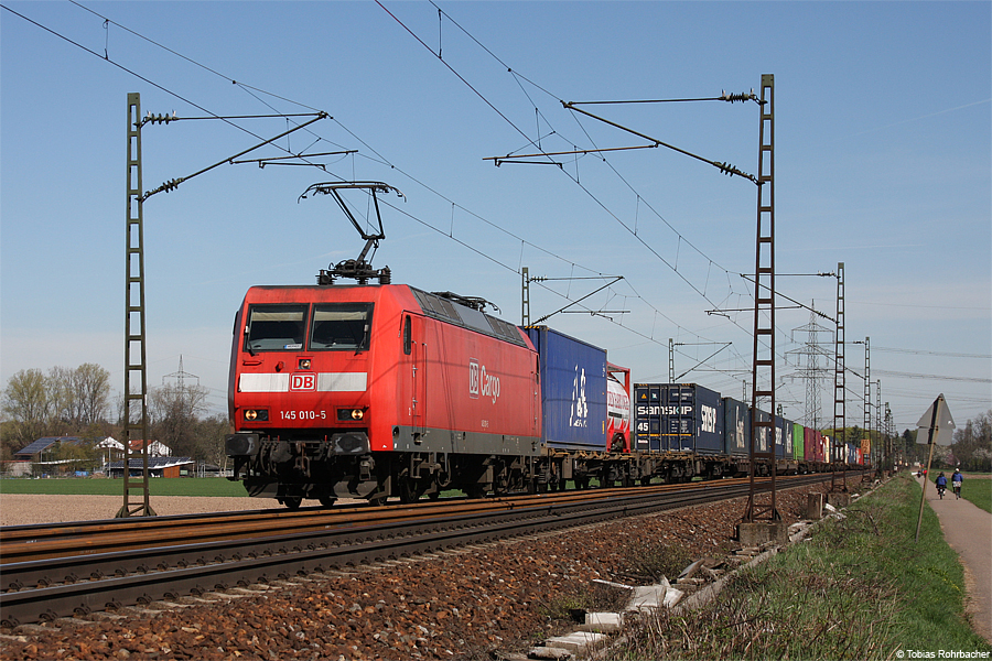 DB Schenker 145 010-5 mit Conteinerzug